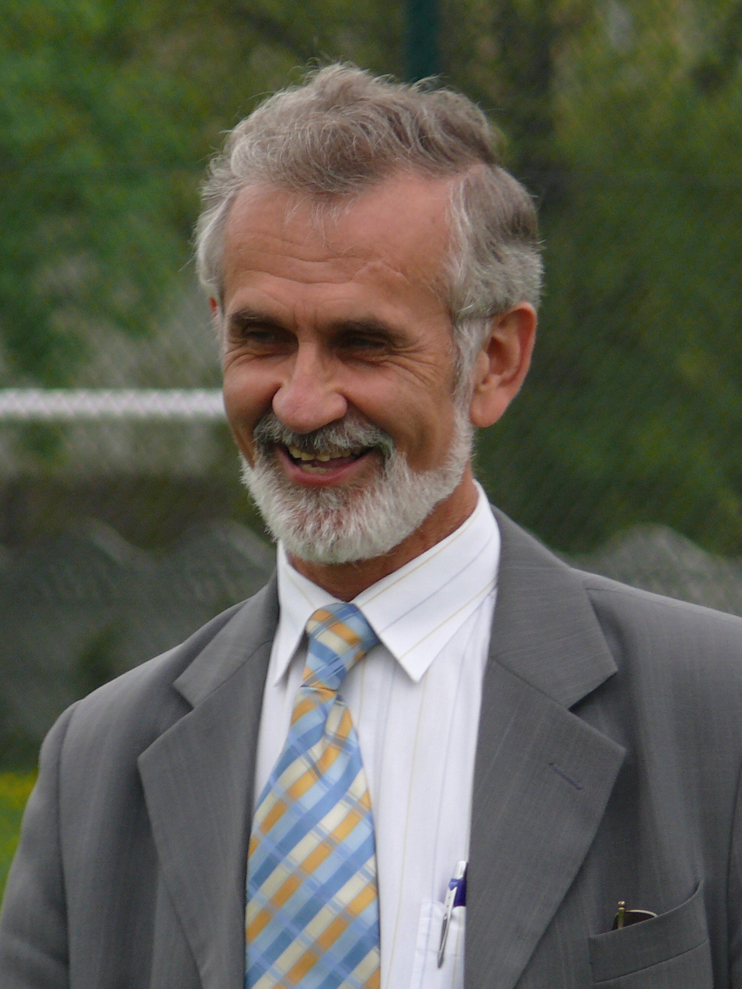 senator Ireneusz Niewiarowski